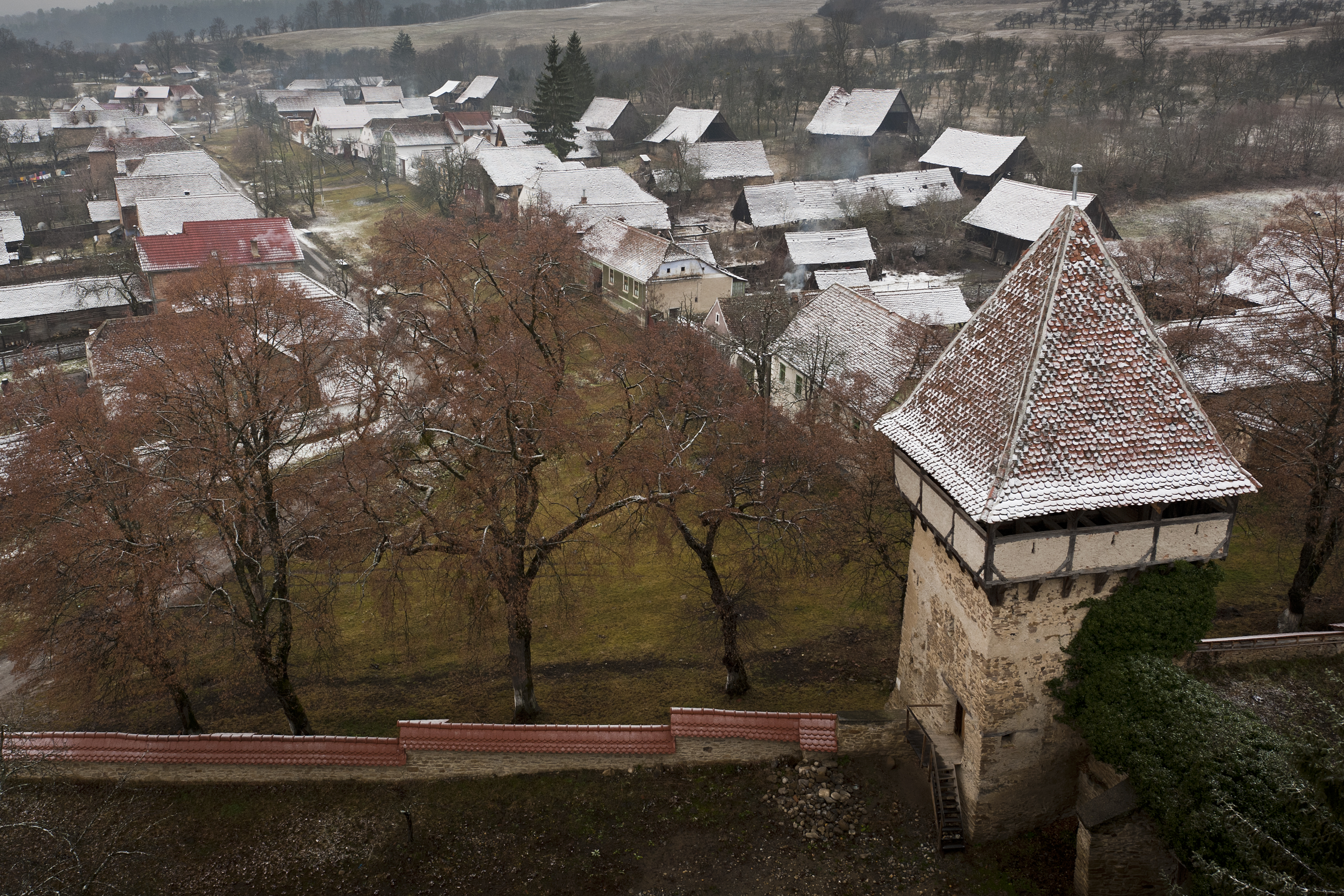 Incintă fortificată, cudouă turnuri, zwinger 02